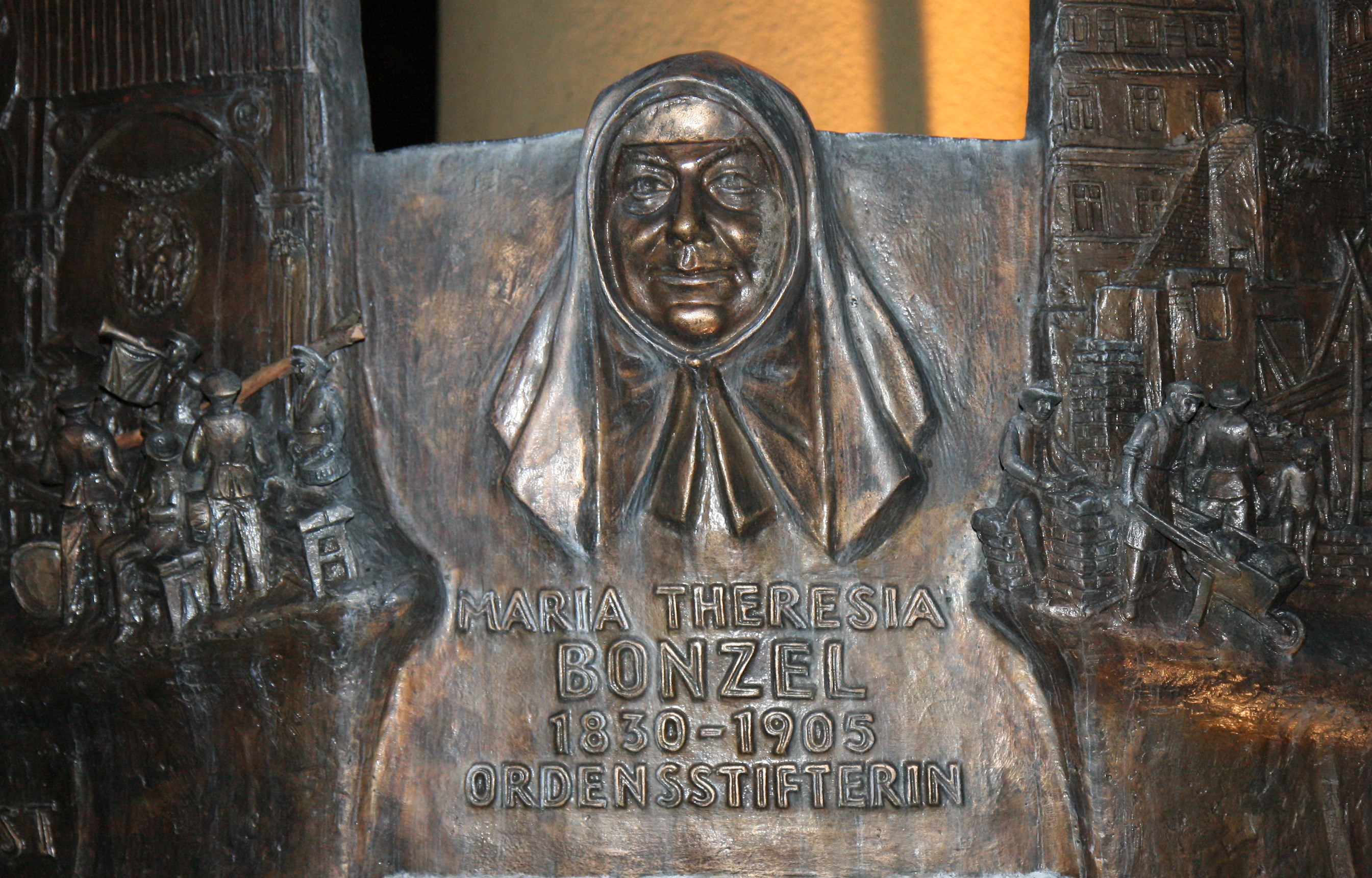 Geschichtsbrunnen am Kurkölner Platz in Olpe. Relief Maria Theresia Bonzel.